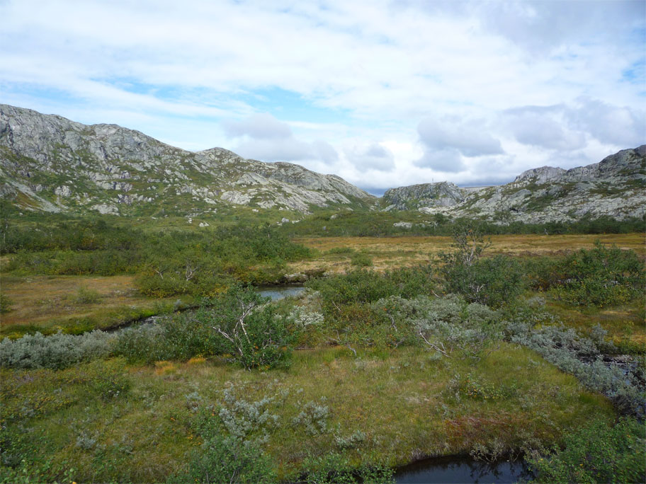 Dyraheio landskapsvernområde